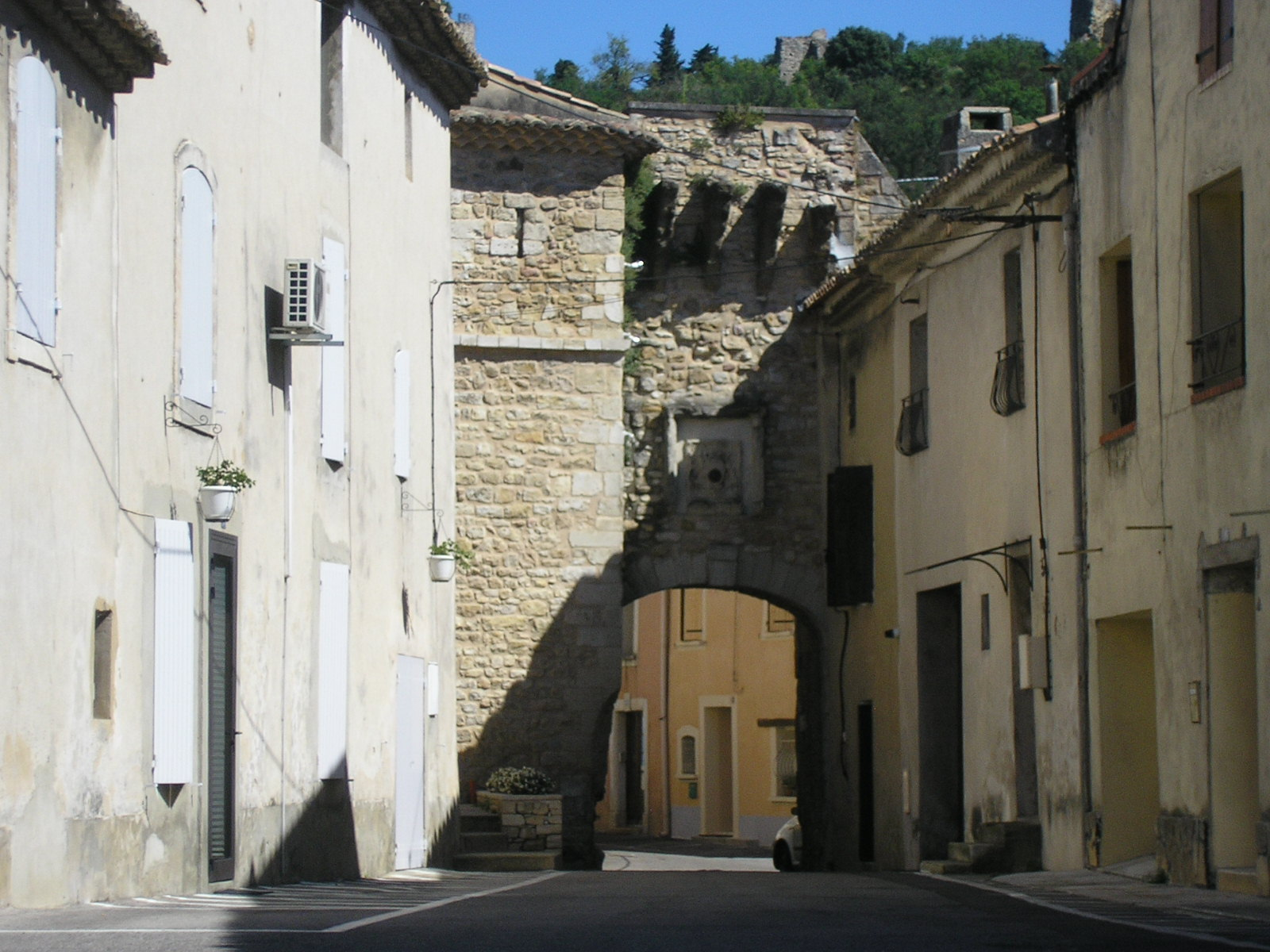 Mondragon - Porte